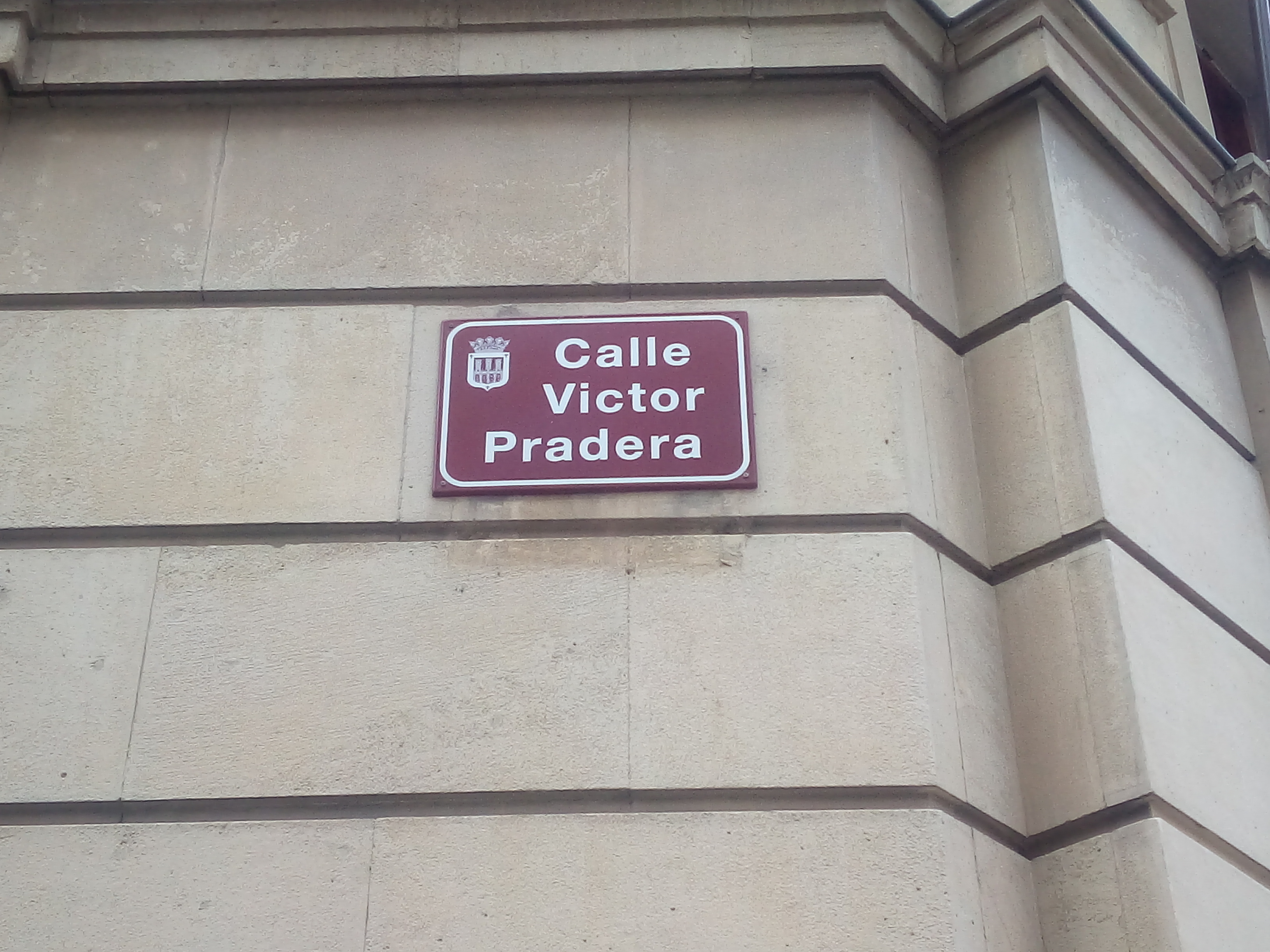 Calle ubicada en Logroño en memoria del político Víctor Pradera, político asesinado por el bando republicano durante la Guerra Civil Española.